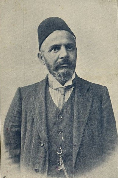 Emanuel Karasu, II. Abdülhamid'in tahttan indirildiğini bildiren heyette yer alan, 3 dönem Meclis-i Mebusan'da mebusluk yapmış Osmanlı Yahudisi avukat ve siyasetçi.